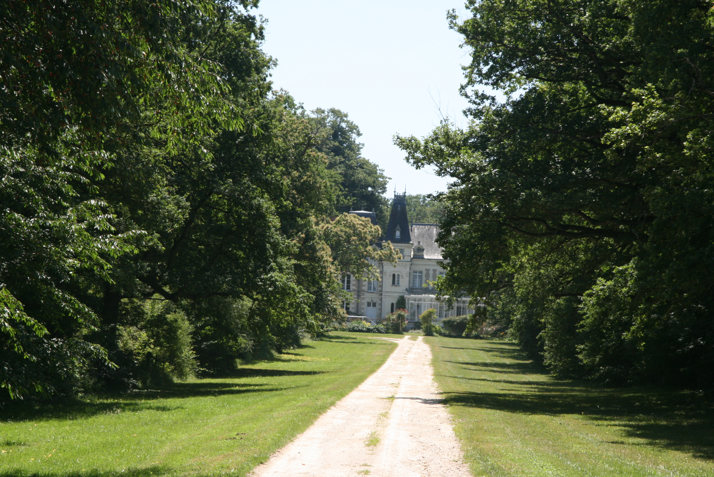 Le château des Genêts sur la commune de Villeloin-Coulangé.